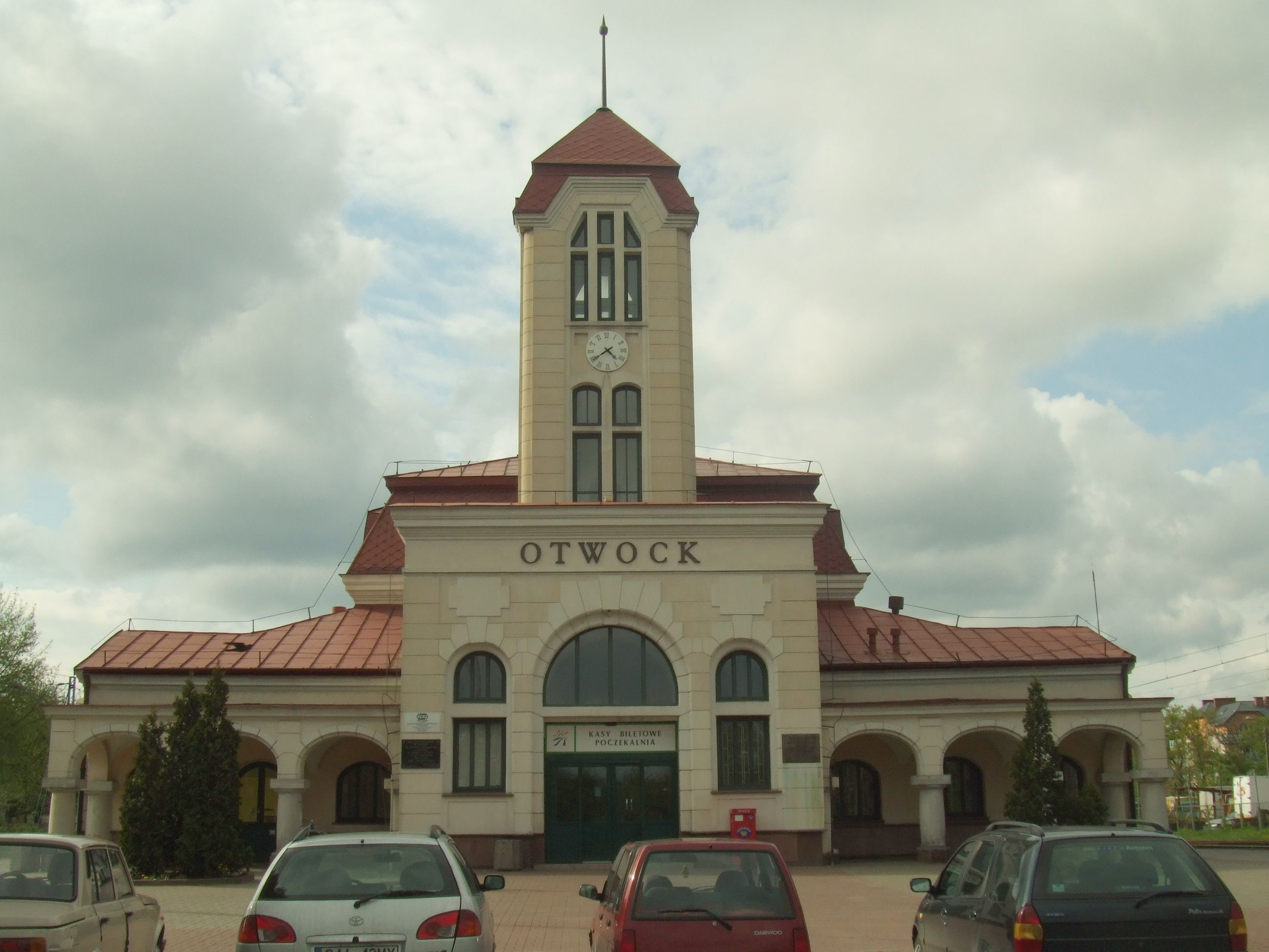 Dworzec kolejowy w Otwocku - przód